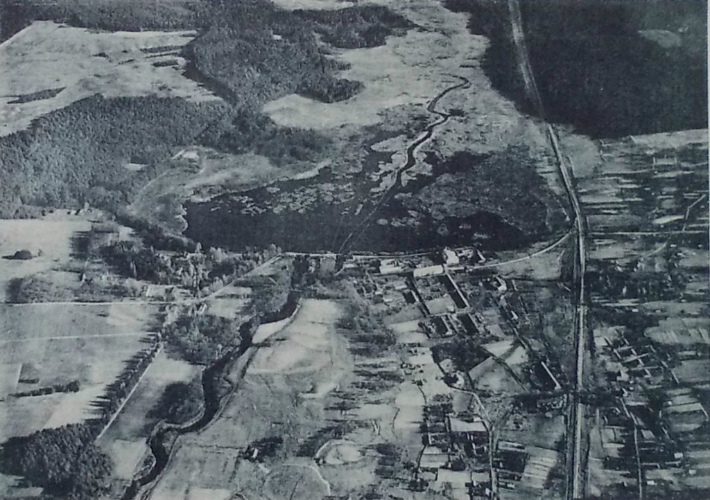 Беларуская (тарашкевіца): Слонім (Słonim), Альбэртын (Albertyn). Аэрафотаздымак